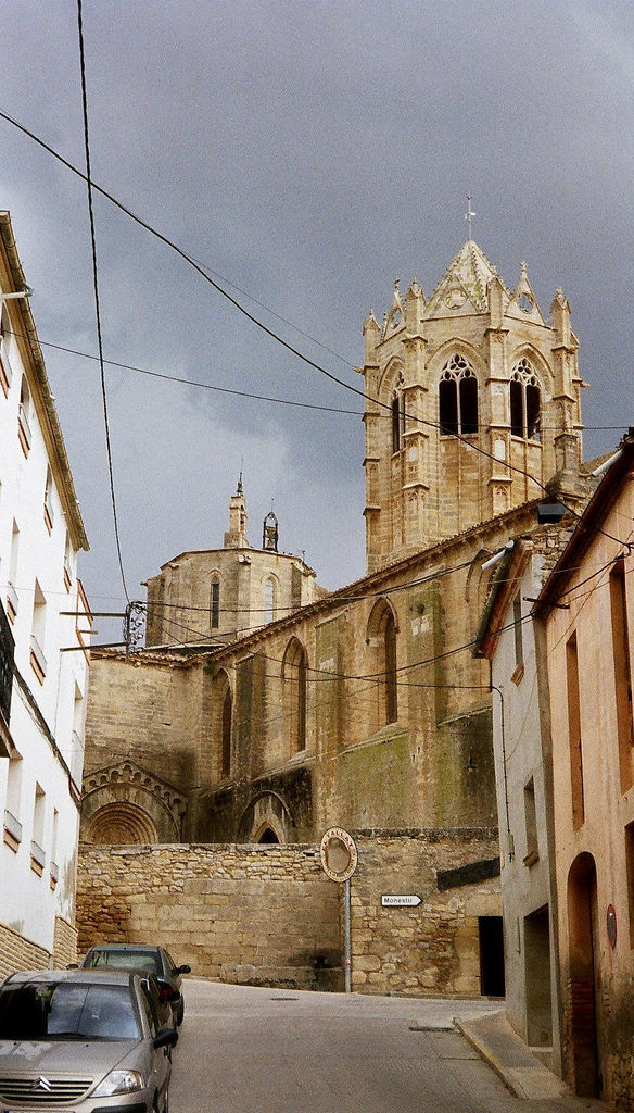 Vallbona de les Monges, Catalunya (Espanya)